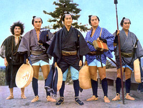 『次郎長三国志』（1963年）のスチル写真、左から田中春男、松方弘樹、鶴田浩二、山城新伍、大木実。